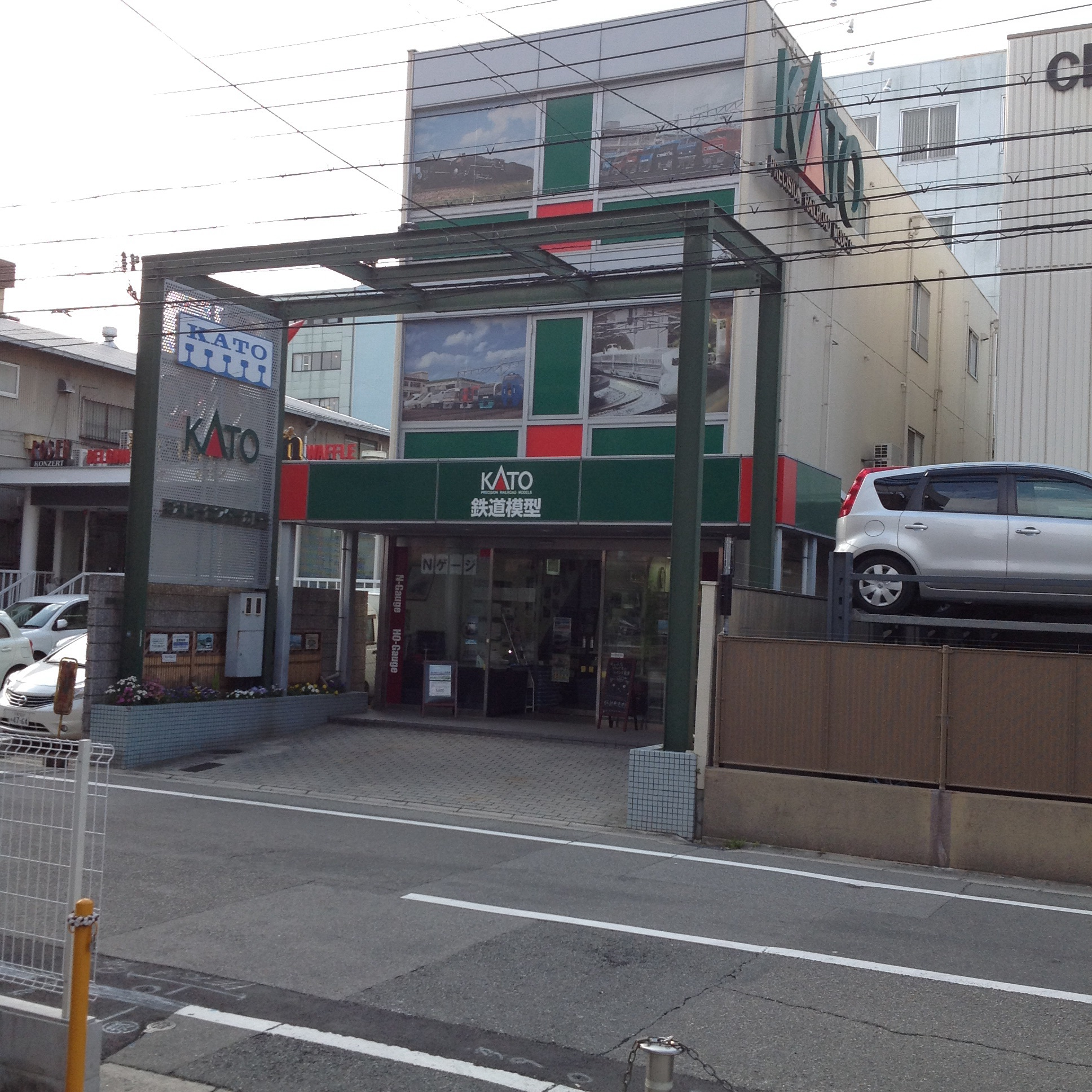 ホビーセンターカトー大阪店のビル。KATOのロゴが大きく出ている。